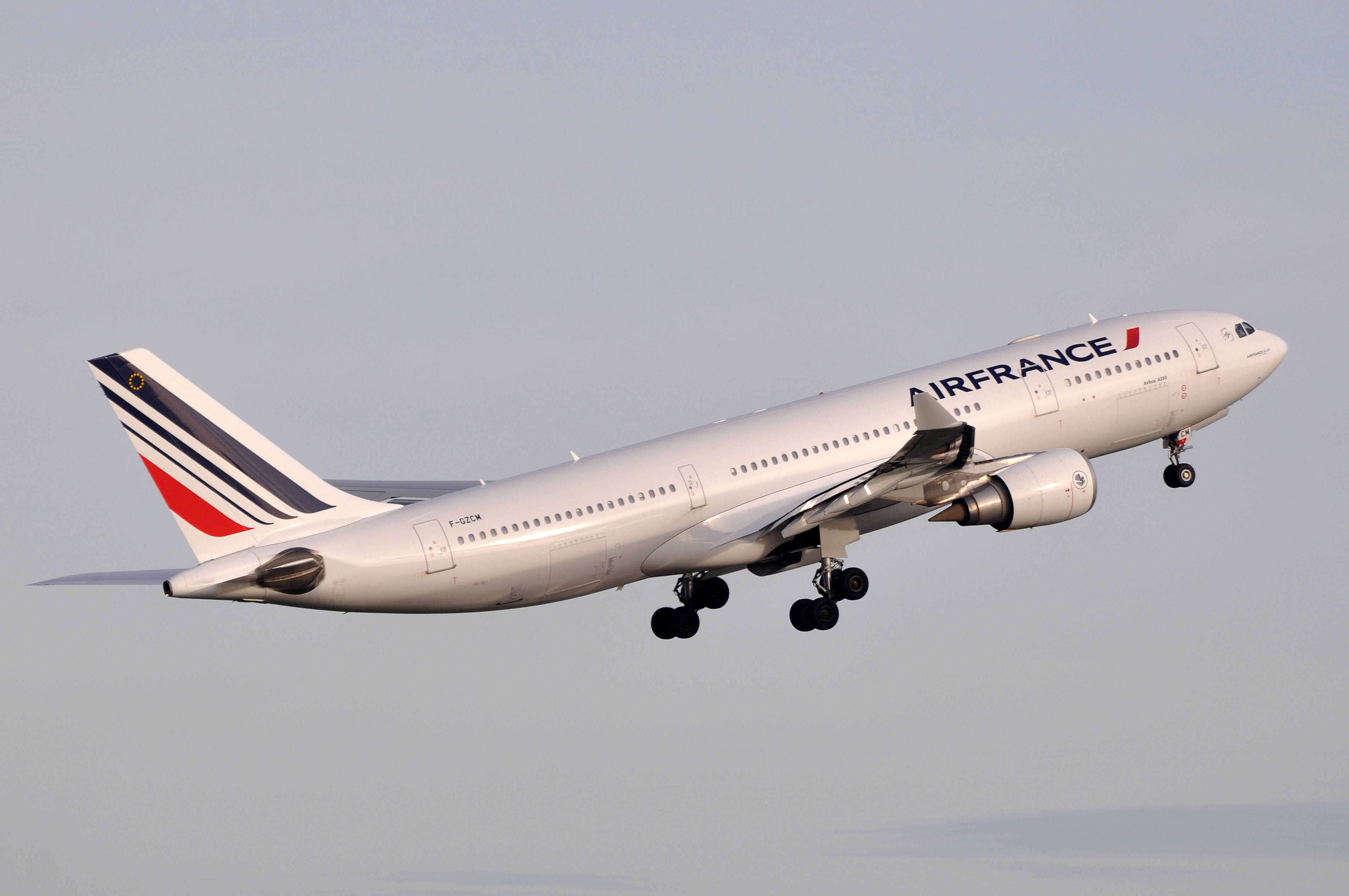 MSN 567 A330-203 AIR FRANCE CDG AIRPORT